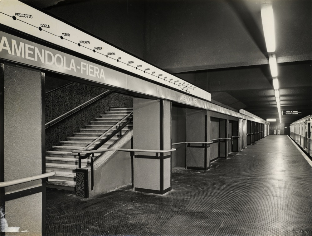 Fermata di Amendola-Fiera M1